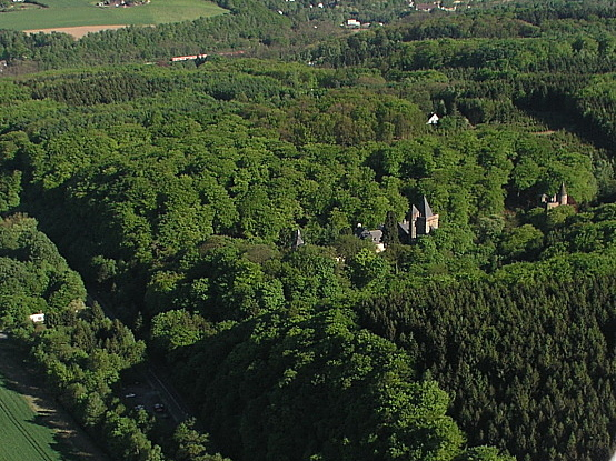 Schloss Landsberg von Wald umgeben. Das Schloss Landsberg ist eine Schlossanlage im Ruhrtal auf dem Stadtgebiet von Ratingen